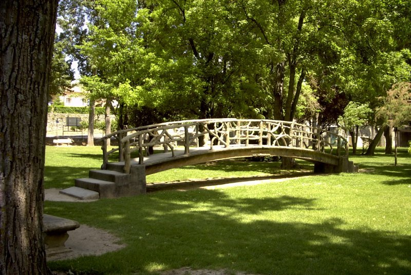 Pont Pétrifié, parc Max Trouche de Sainte-Tulle, France